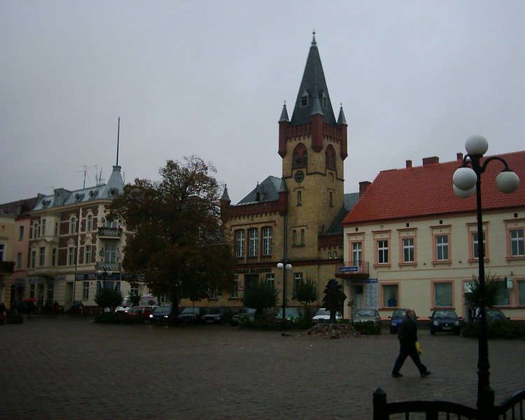 Town Square in Świecie, Poland